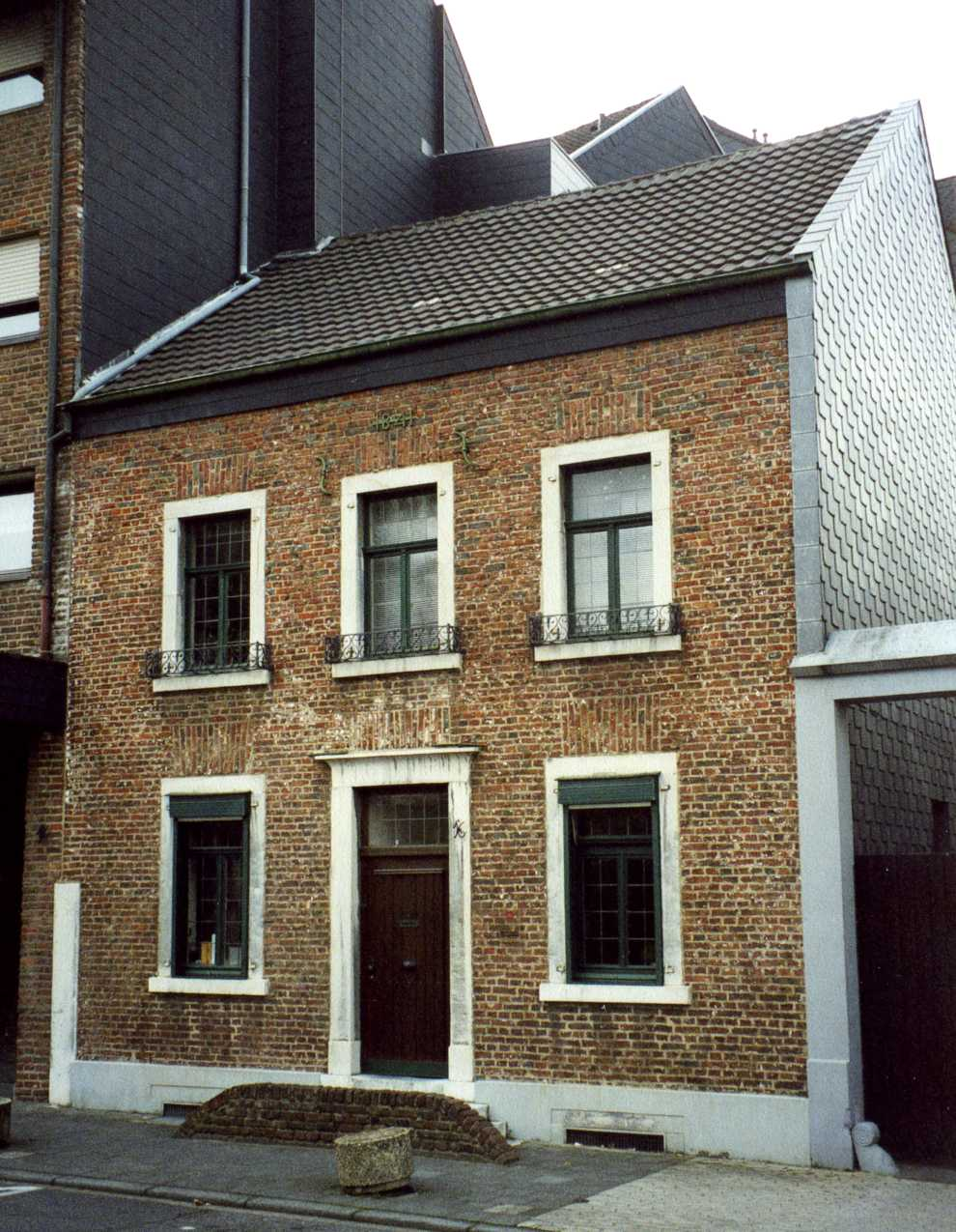 Blausteinhaus auf der unteren Wollenweberstraße in der Eschweiler Altstadt